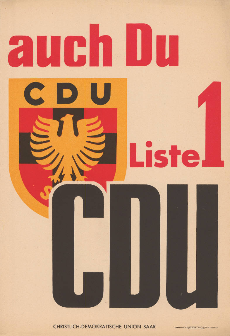 auch Du CDU Liste 1 CDU Christlich-Demokratische Union Saar Abbildung: CDU-Wappen Plakatart: Motiv-/Textplakat Drucker_Druckart_Druckort: Offsetdruck Klinke & Co. GmbH, Saarbrücken Objekt-Signatur: 10-011 : 100 Bestand: Landtagswahlplakate Saarland (10-011) GliederungBestand10-18: Landtagswahlplakate Saarland (10-011) » CDU Lizenz: KAS/ACDP 10-011 : 100 CC-BY-SA 3.0 DE